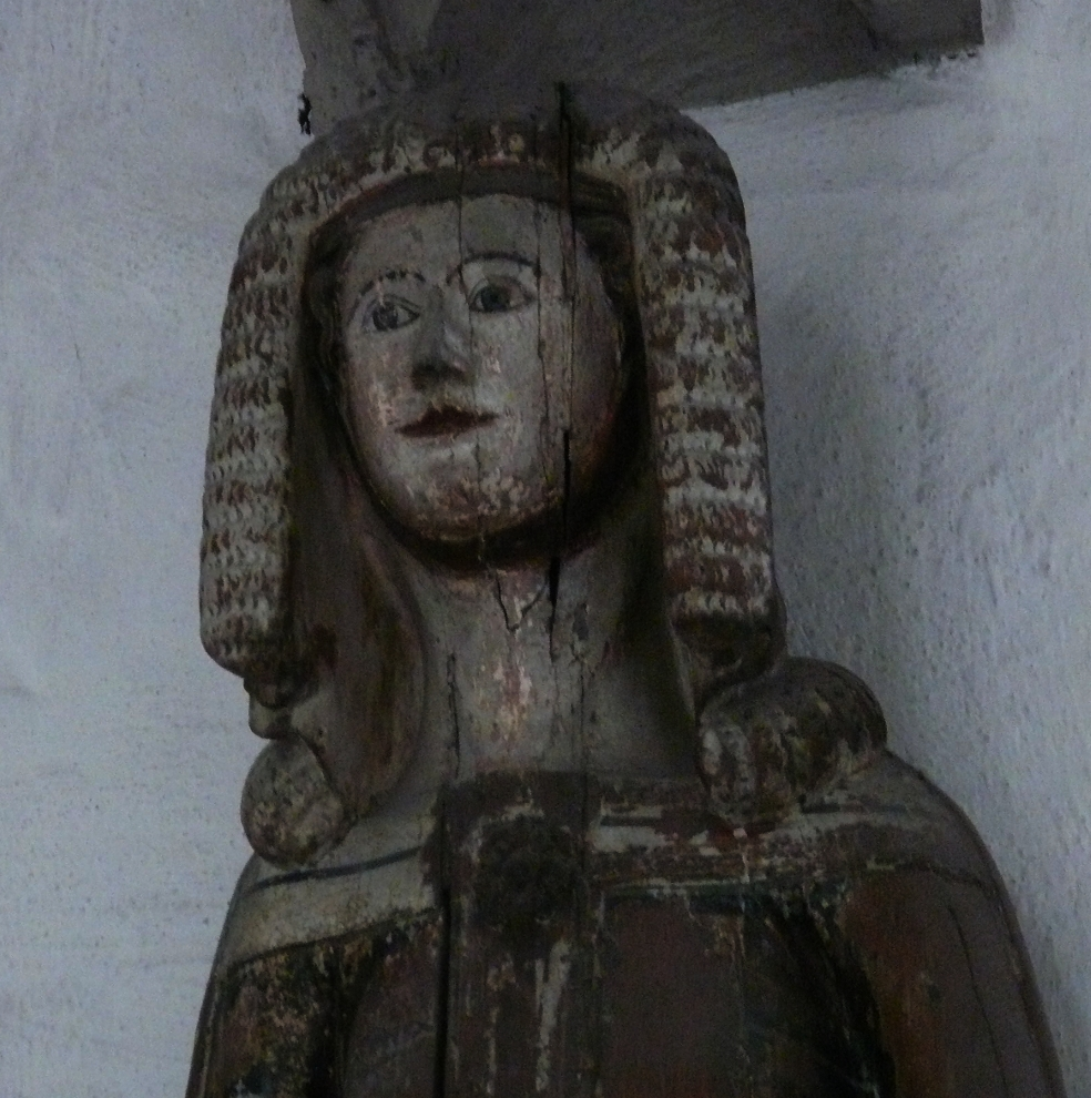 Agnes of Branderburg (1334)